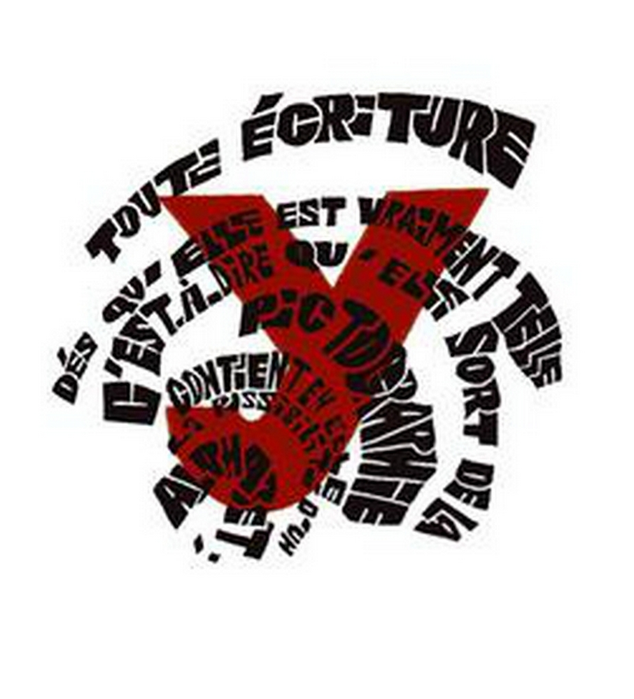 Page linogravée par Claude Stassart-Springer, extraite du livre "Alphabet" de Raymond Queneau aux Editions de la Goulotte